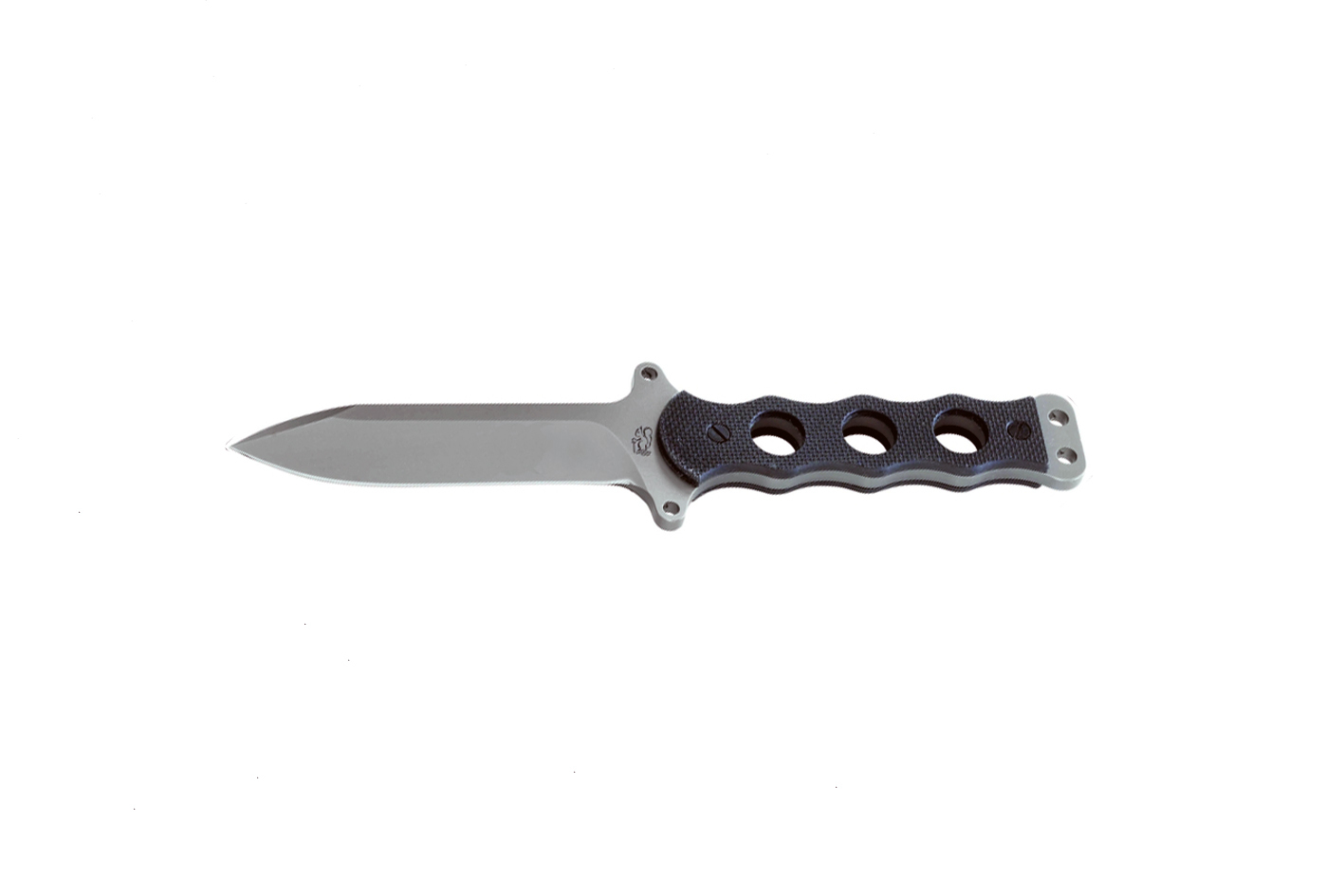 Messer ohne Sägezahn